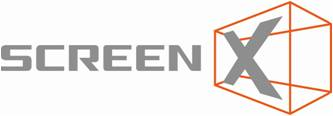 ScreenX Logo